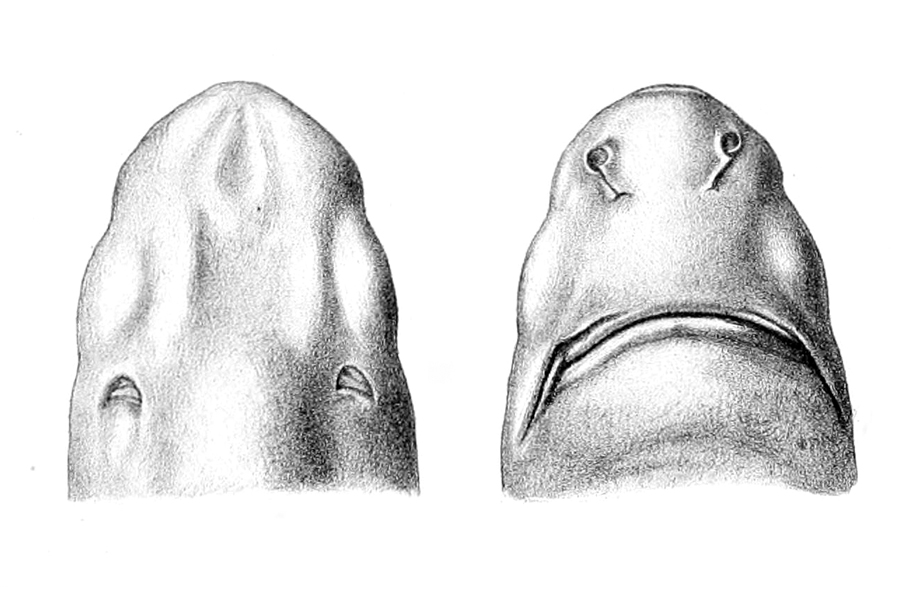 Centroscymnus coelolepis